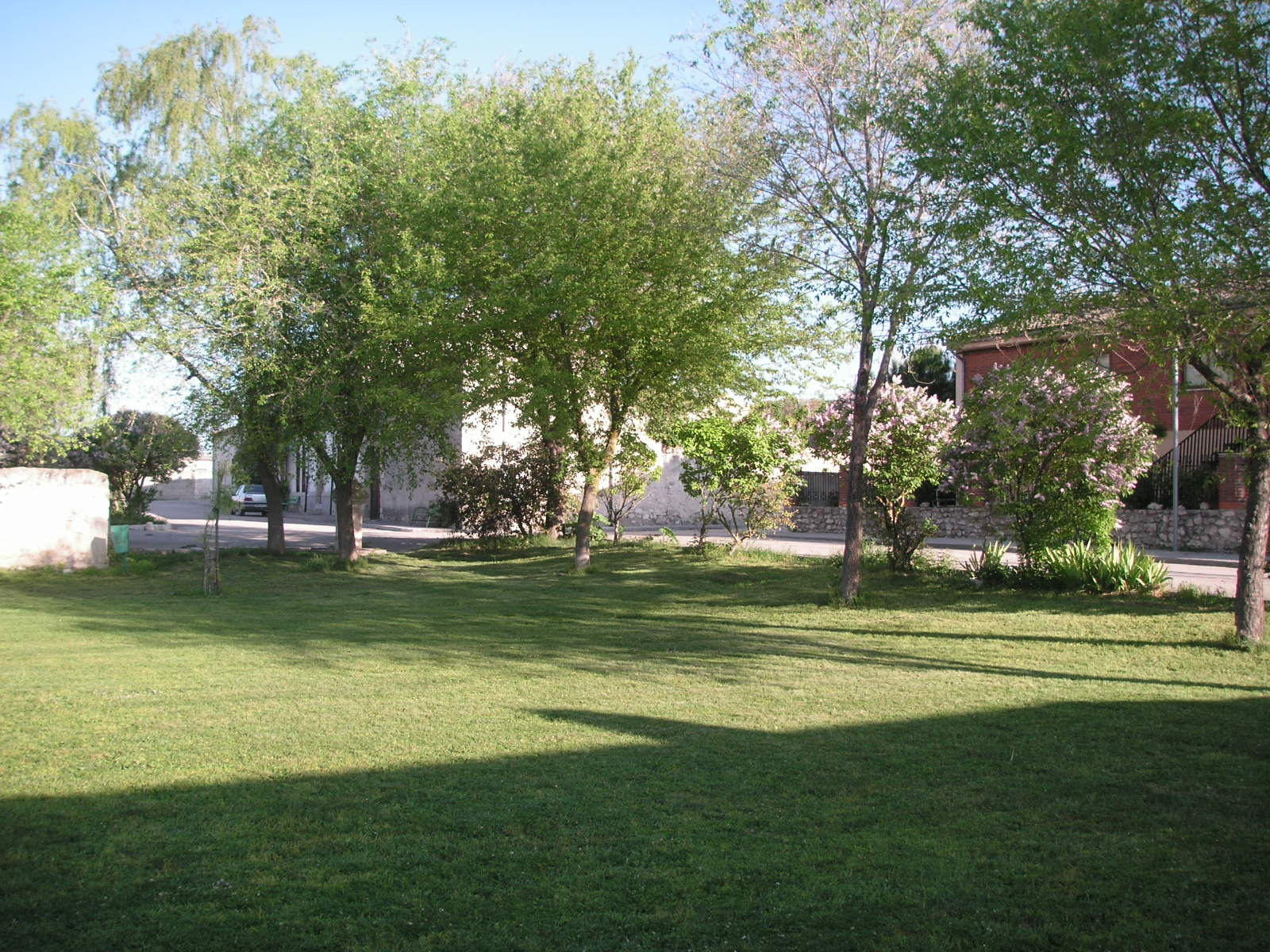 El Pradillo, plaza mayor de Vegafría, Segovia, España